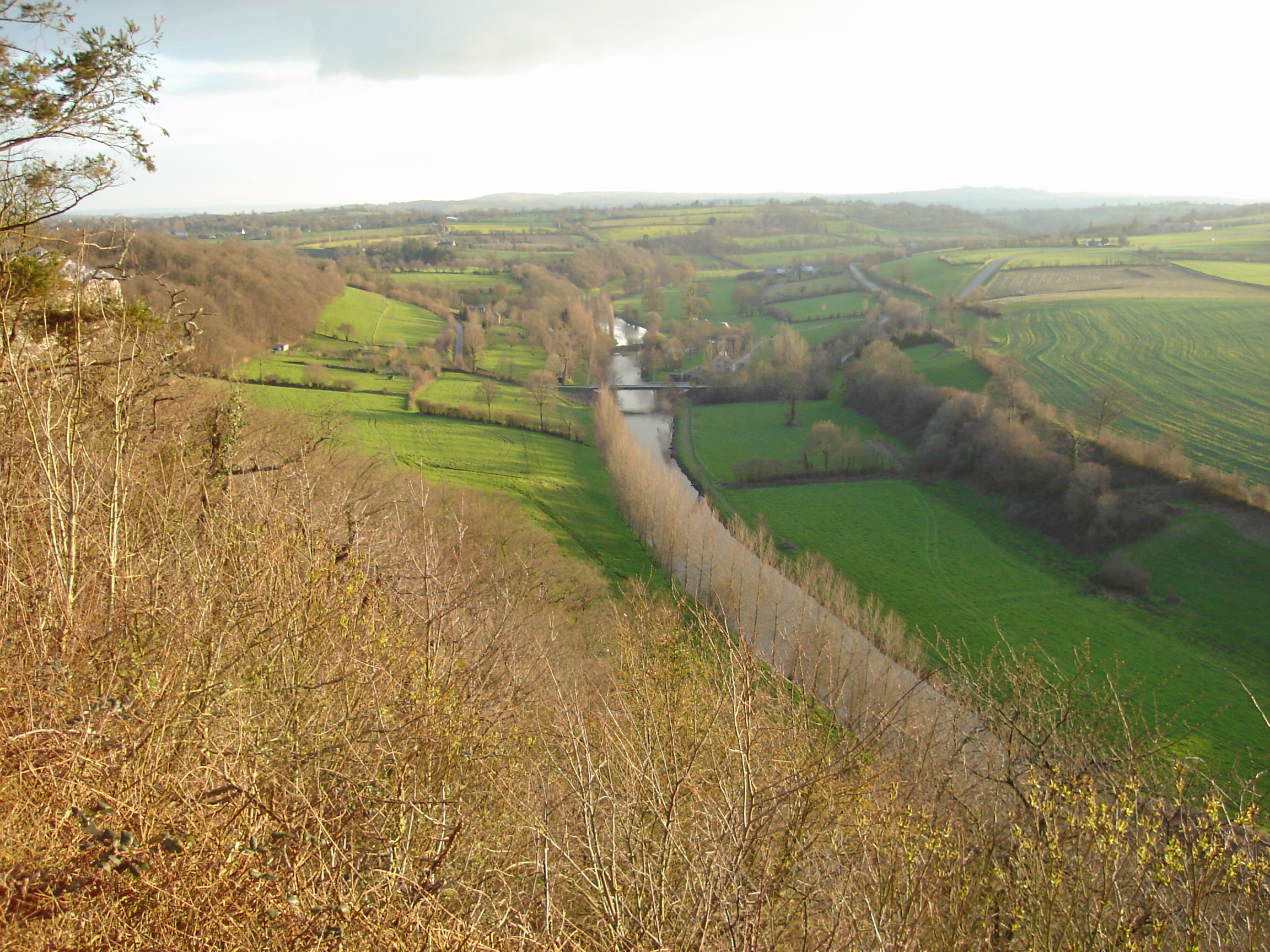 Vue du haut des Roches de Ham(Manche).